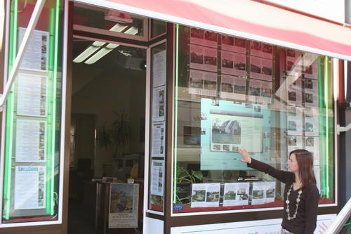 Vitrine tactile utilisé par une agence immobilière